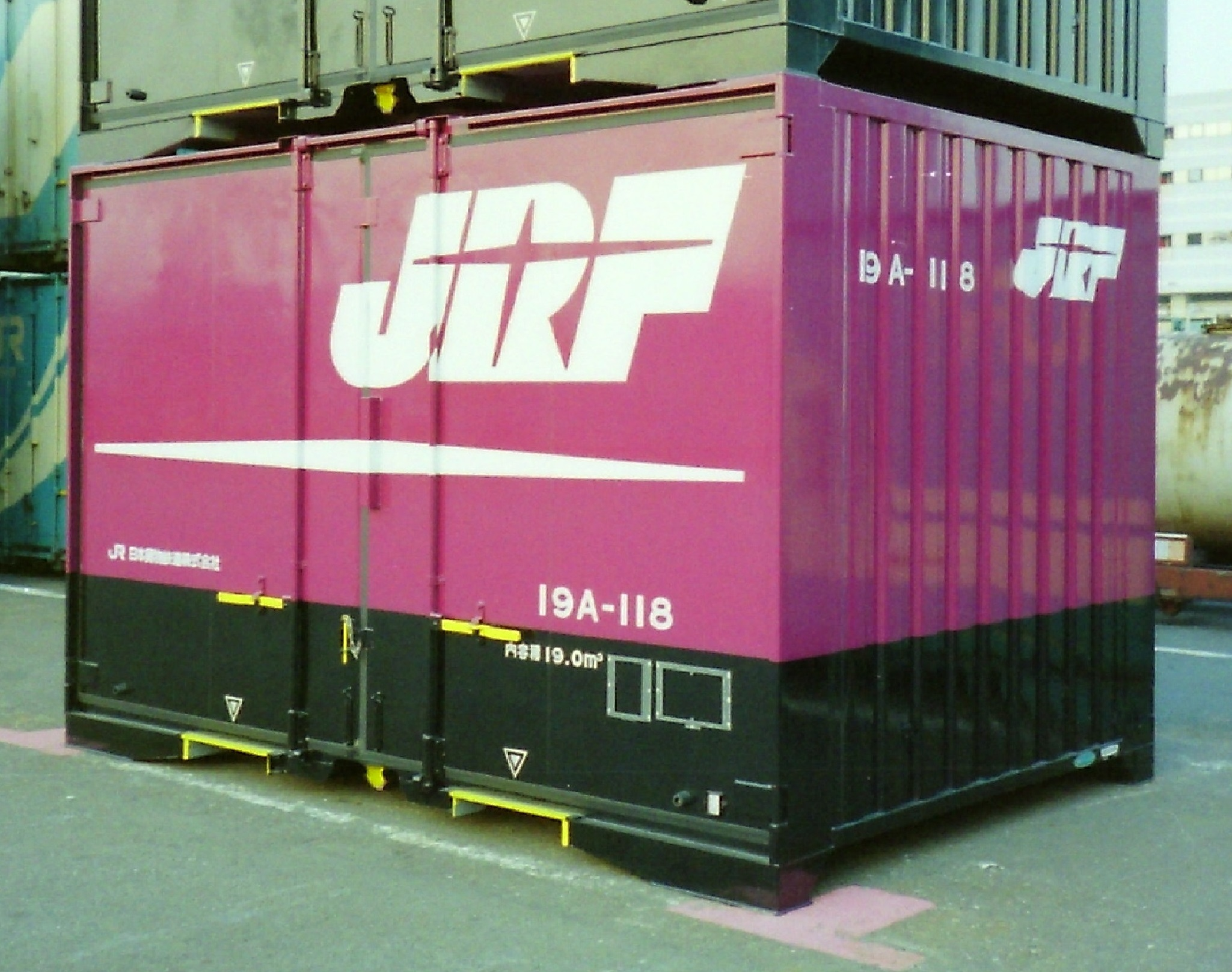 撮影地＝東京(タ)